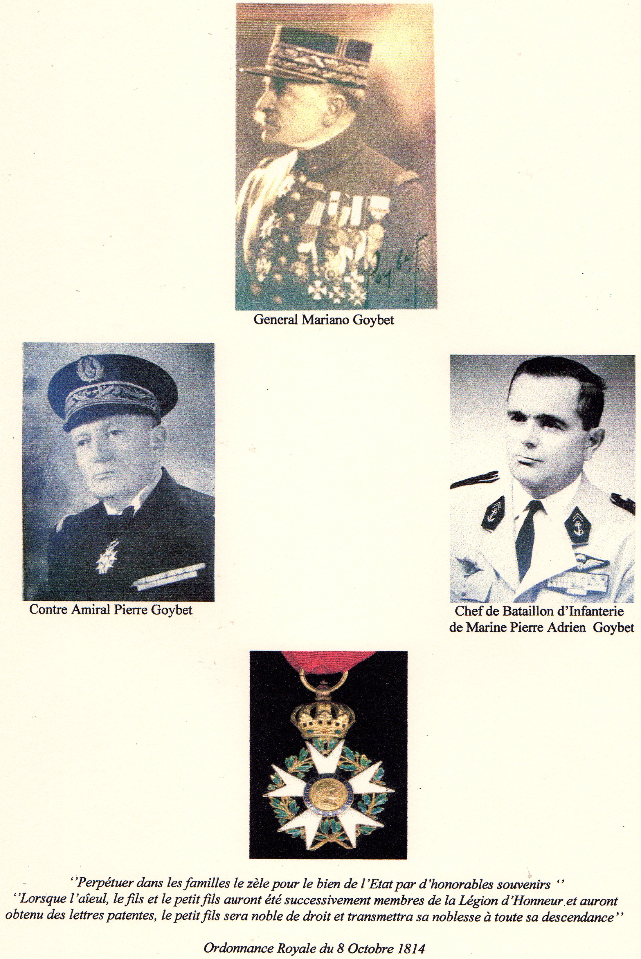 Général Mariano Goybet grand officier de la légion d'honneur (1861-1943); son fils Pierre Goybet Contre-amiral (1887-1963) Commandeur ; son petit fils Adrien pierre Goybet (1922-1995) Chevalier dans l'ordre, constituent trois générations de Légion d'honneur. Travail effectué par Henri Goybet, fils d'Adrien qui fit ses classes au 27ième bataillon de chasseurs Alpins pour honorer la mémoire de Mariano, alpin lui-même.